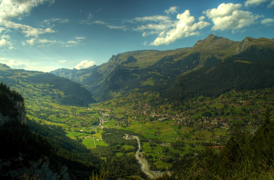 Grindelwald Village, Switzerland, Bern Canton